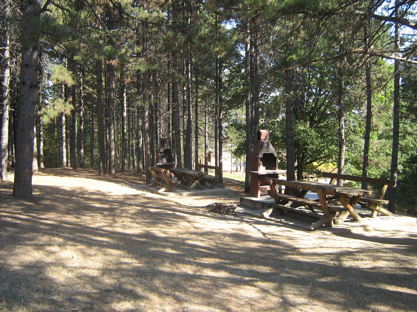 Сликао Нешковић Дејан